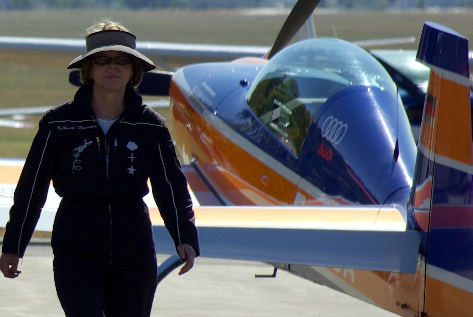 Catherine Maunoury et son Extra 300LP après une démonstration au meeting aérien de Gimont (Gers), le 2 octobre 2011.